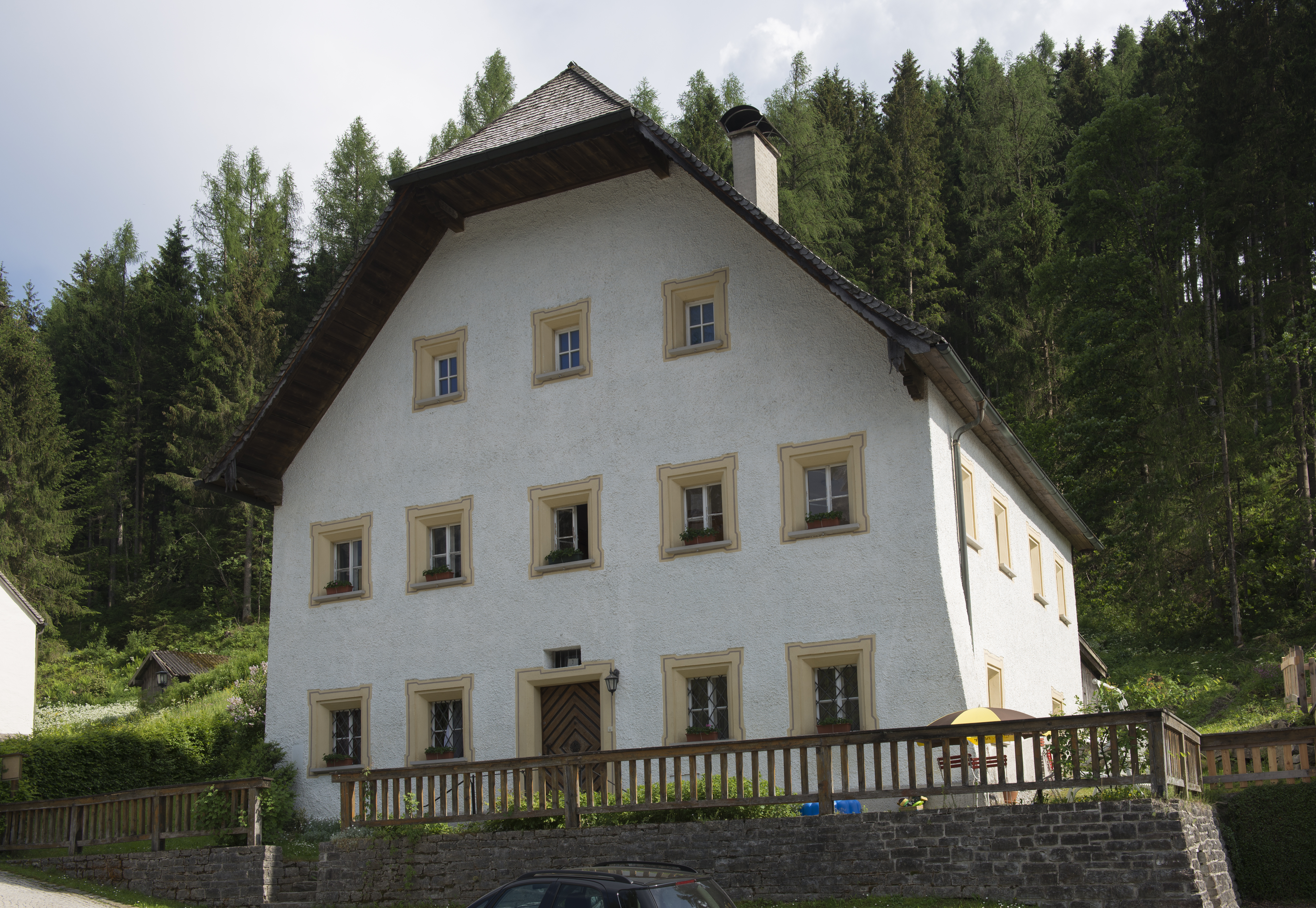 Pfarrhof